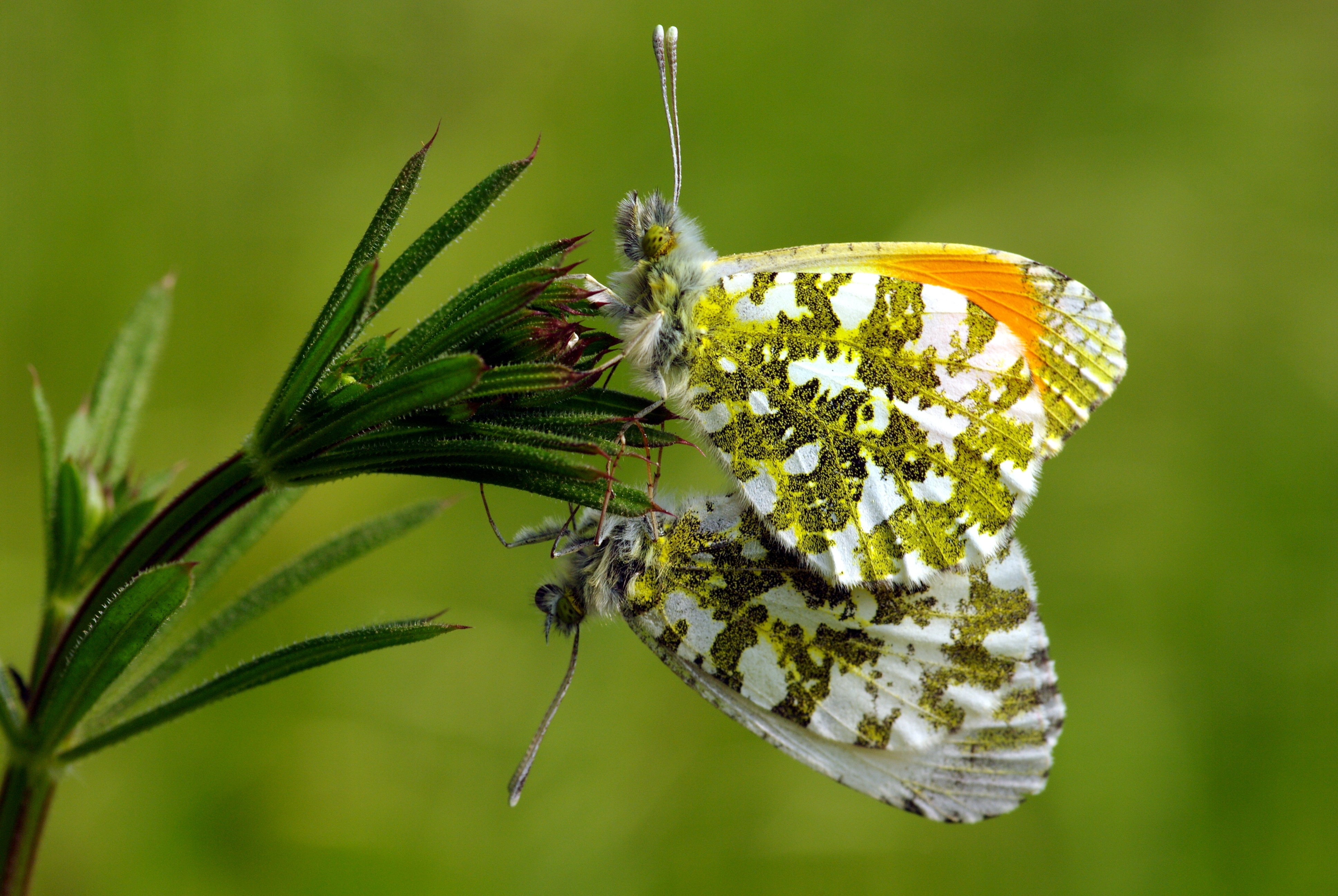 Accouplement du papillon aurore (antocharis cardamines), Normandie.